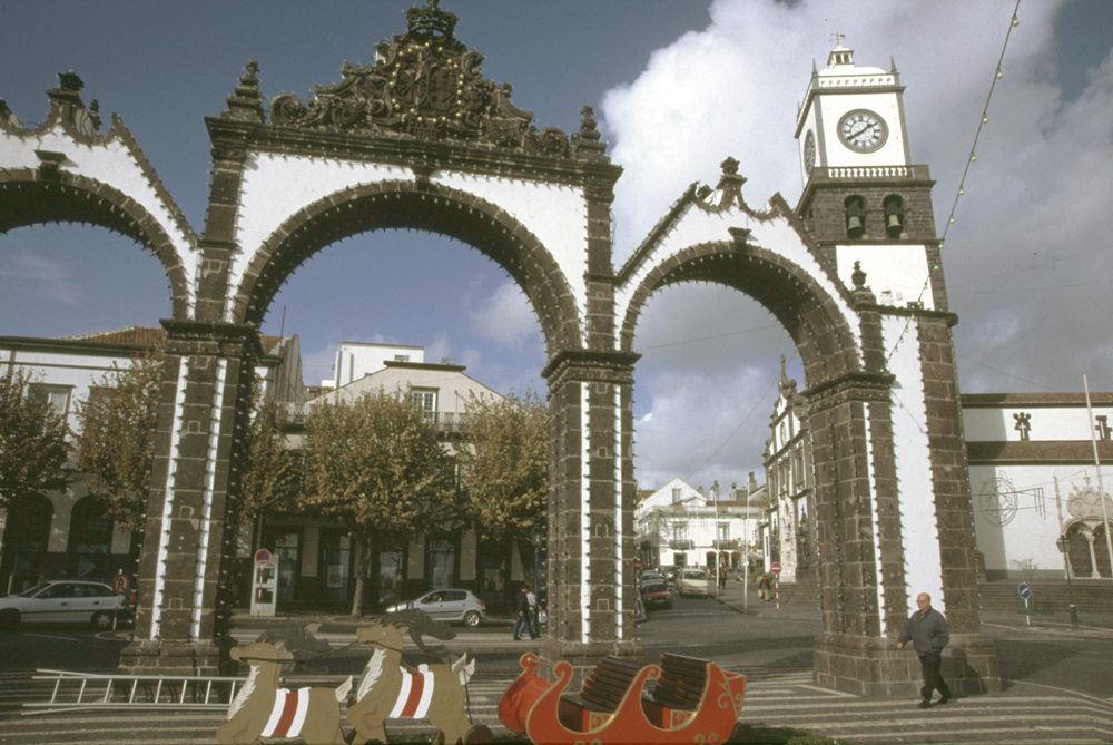 Portas da Cidade de Ponta Delgada, Ilha de São Miguel, Açores, Portugal.